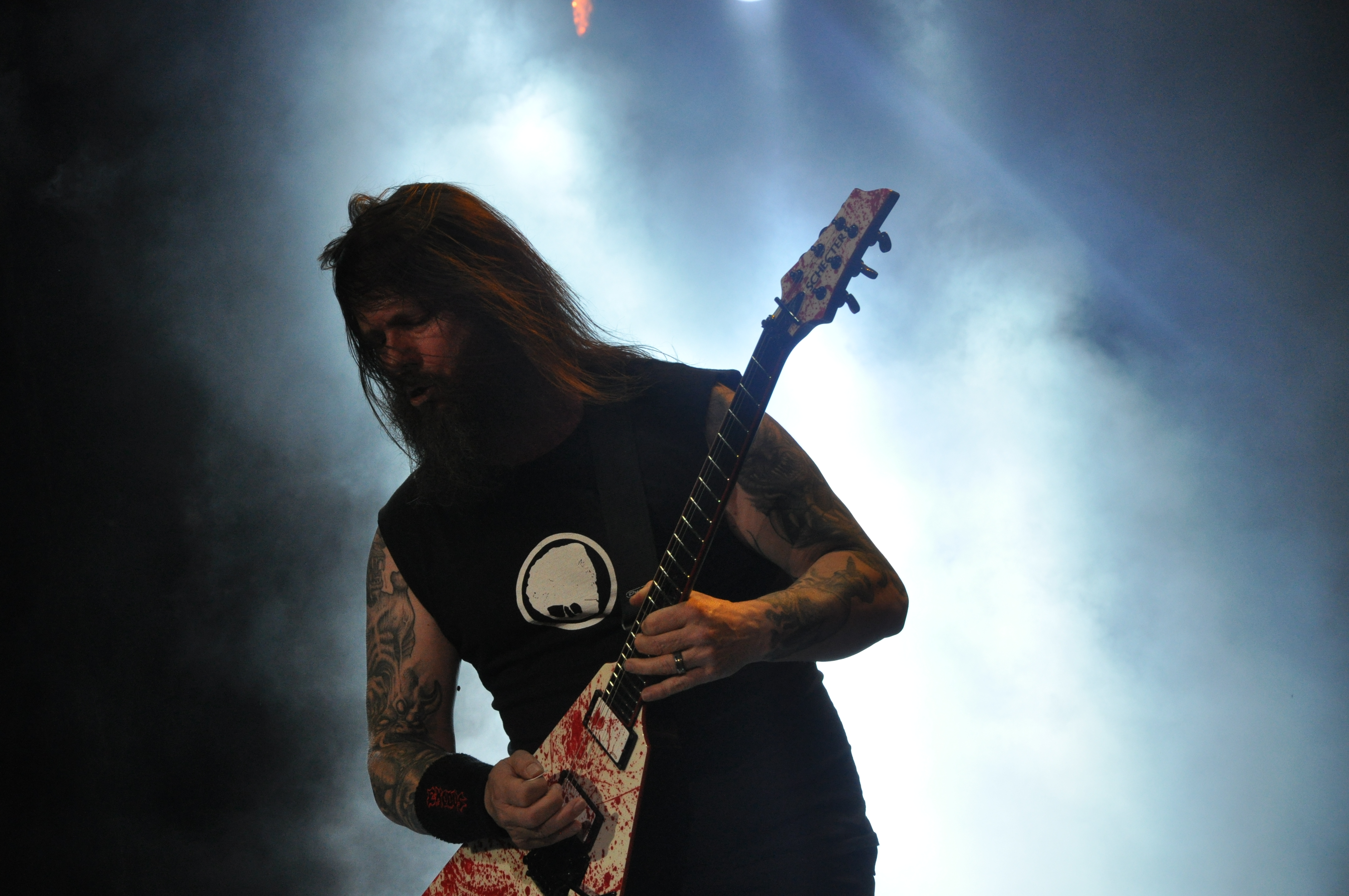 Slayer auf der Alternastage bei Rock am Ring 2014